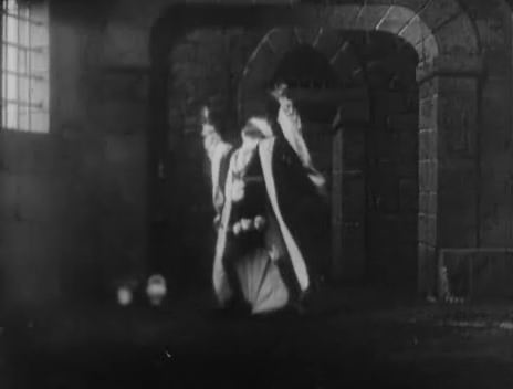 L'Inferno, Milano Films, 1911, paolo e francesca